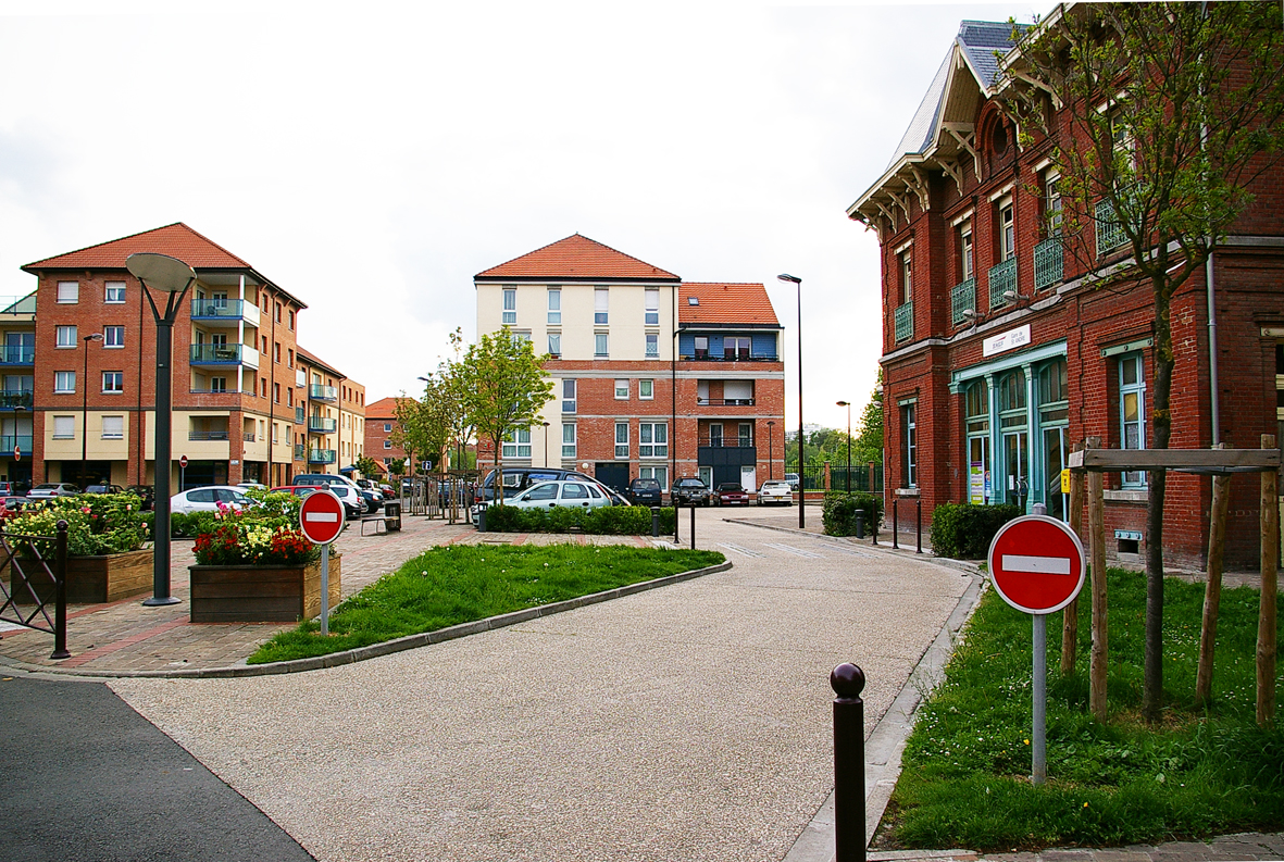 Un nouveau quartier a émergé autour de la gare. Les rues s'appellent Francis Blanche, Lino Ventura ou Michel Audiard.